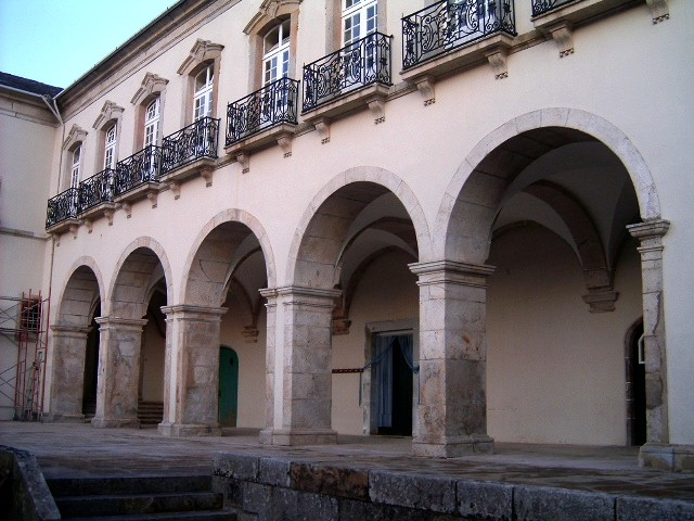 Claustro do Convento dos Lóios, em Vilar de Frades